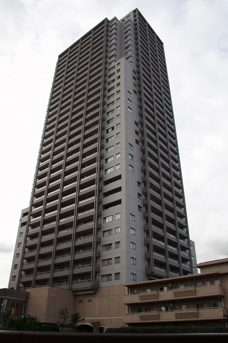 代官山アドレス ザ・タワー。Hadge撮影。